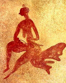 Gravure rupestre du Tassili (Algérie) datée de 4000 av. J.-C.